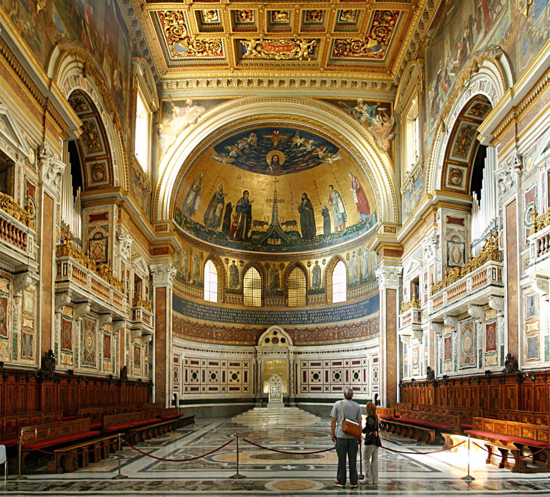 Chorraum und Apsis von San Giovanni in Laterano, Rom